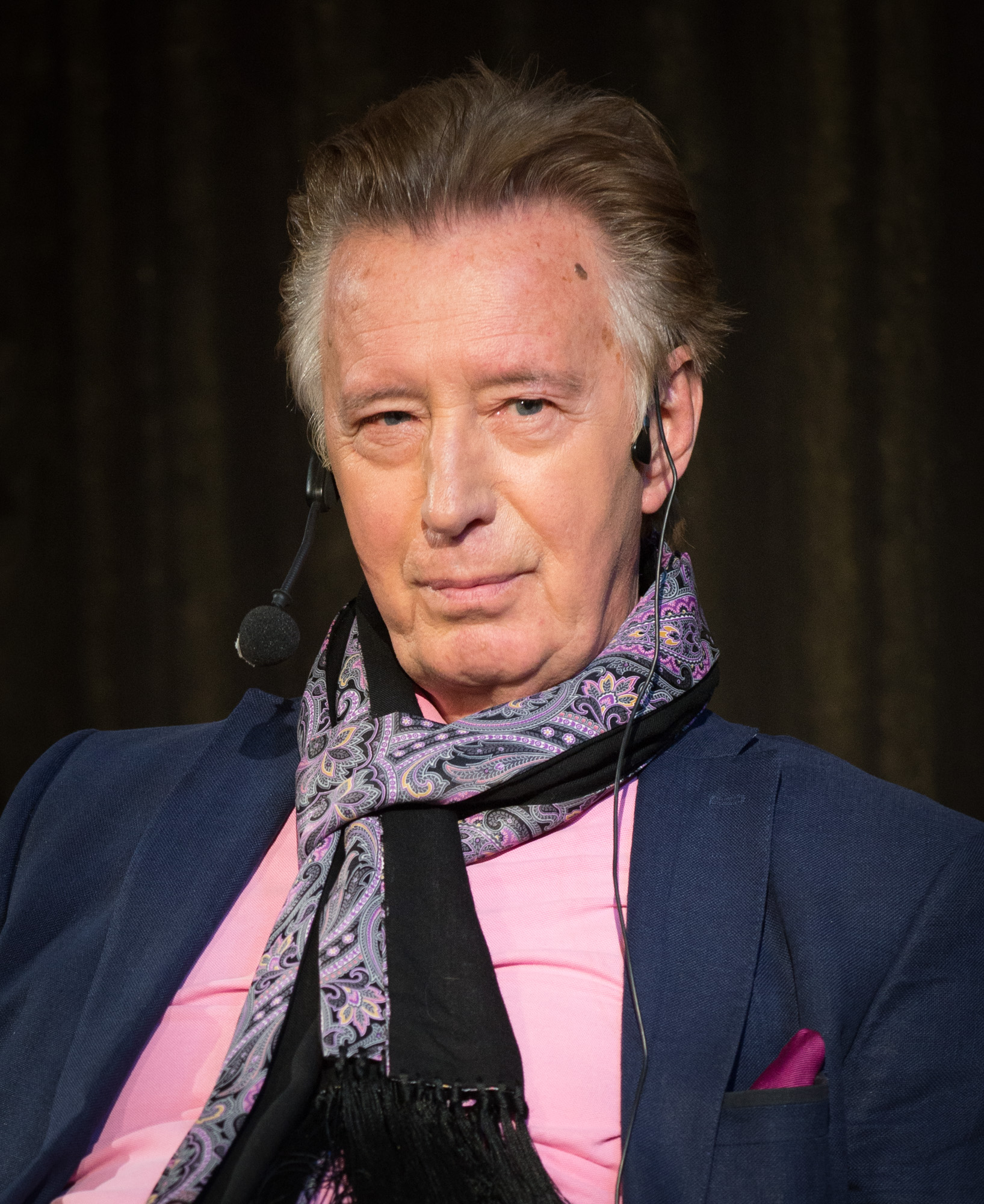 Thommy Berggren i ett samtal om filmen och personen Joe Hill på Folkets Bio i Stockholm den 19 november 2015.